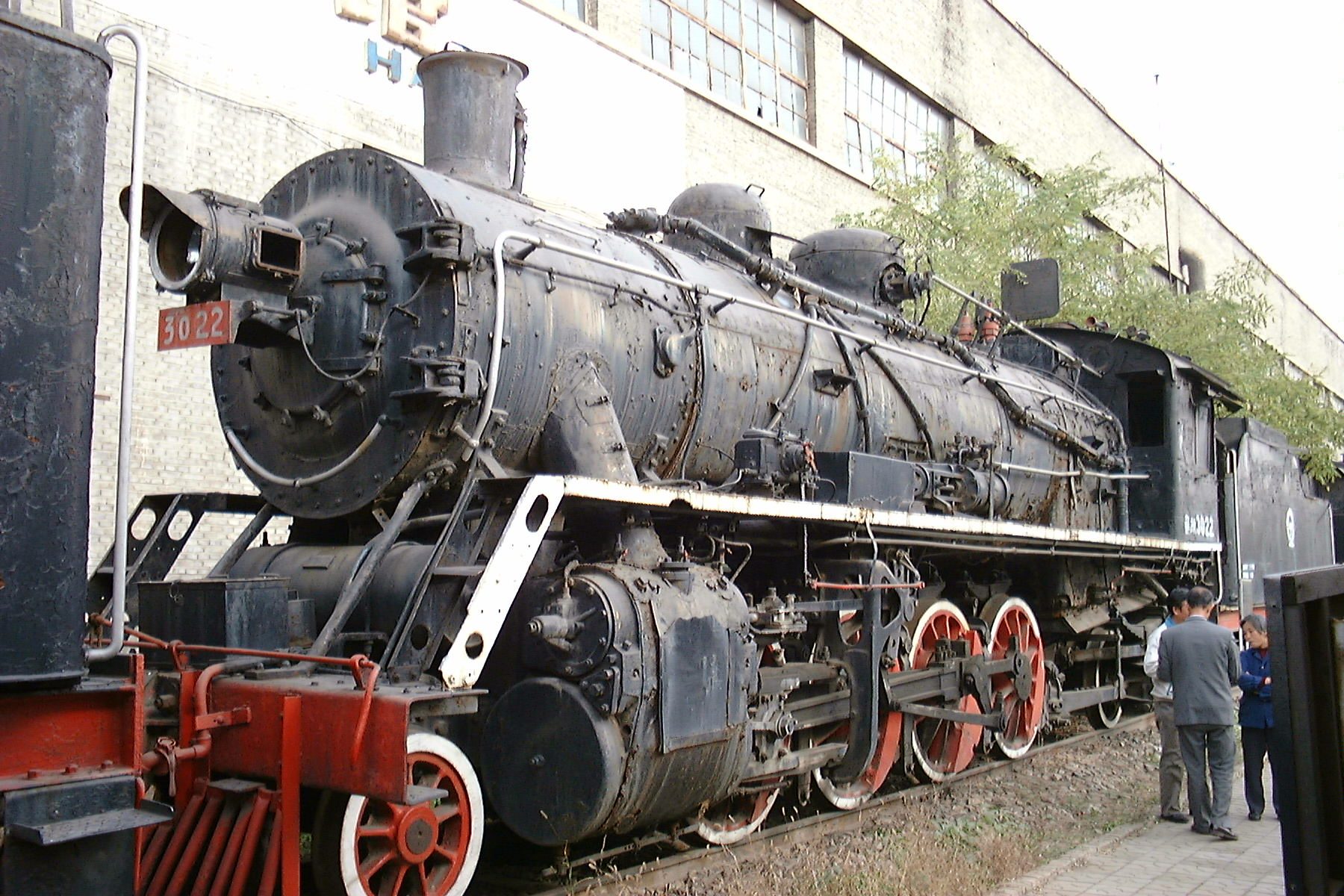 Datong railway museum